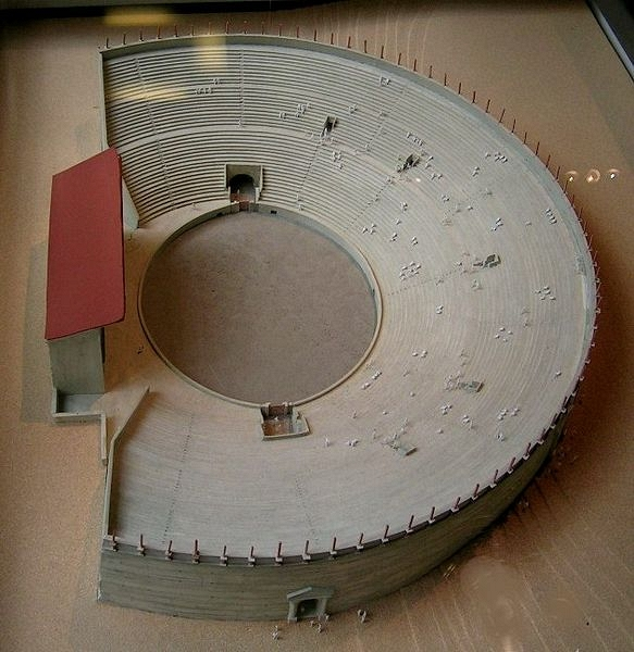 Maquette des arènes de Lutèce